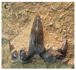 Glikmanius occidentalis tooth. Specimen USNM 14107, from undetermined Carboniferous of Illinois, labial view.